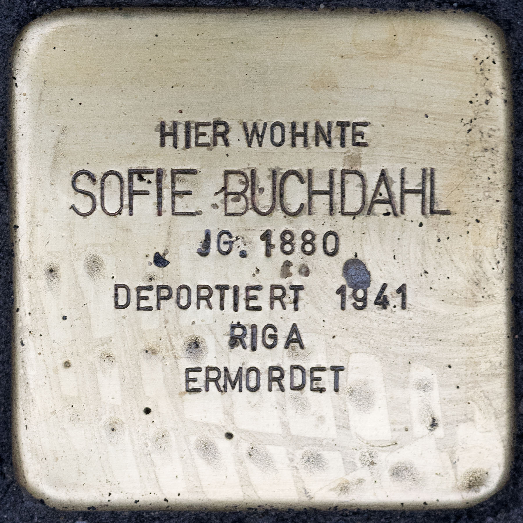 Stolpersteine Kempen: Sofie Buchdahl